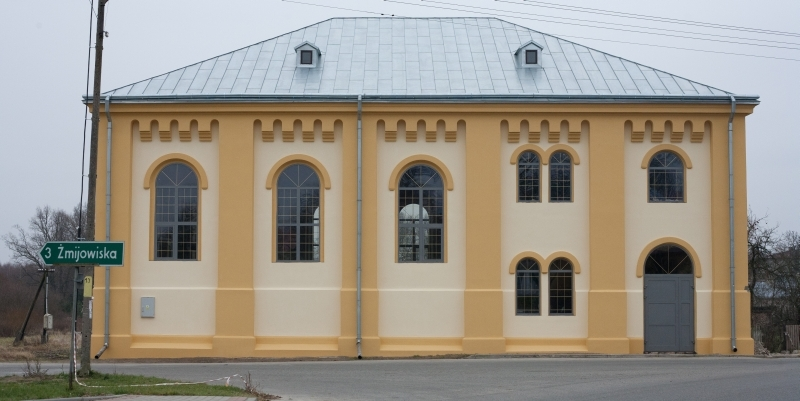 Synagoga w Wielkich Oczach po remoncie przeprowadzonym w 2011 roku.